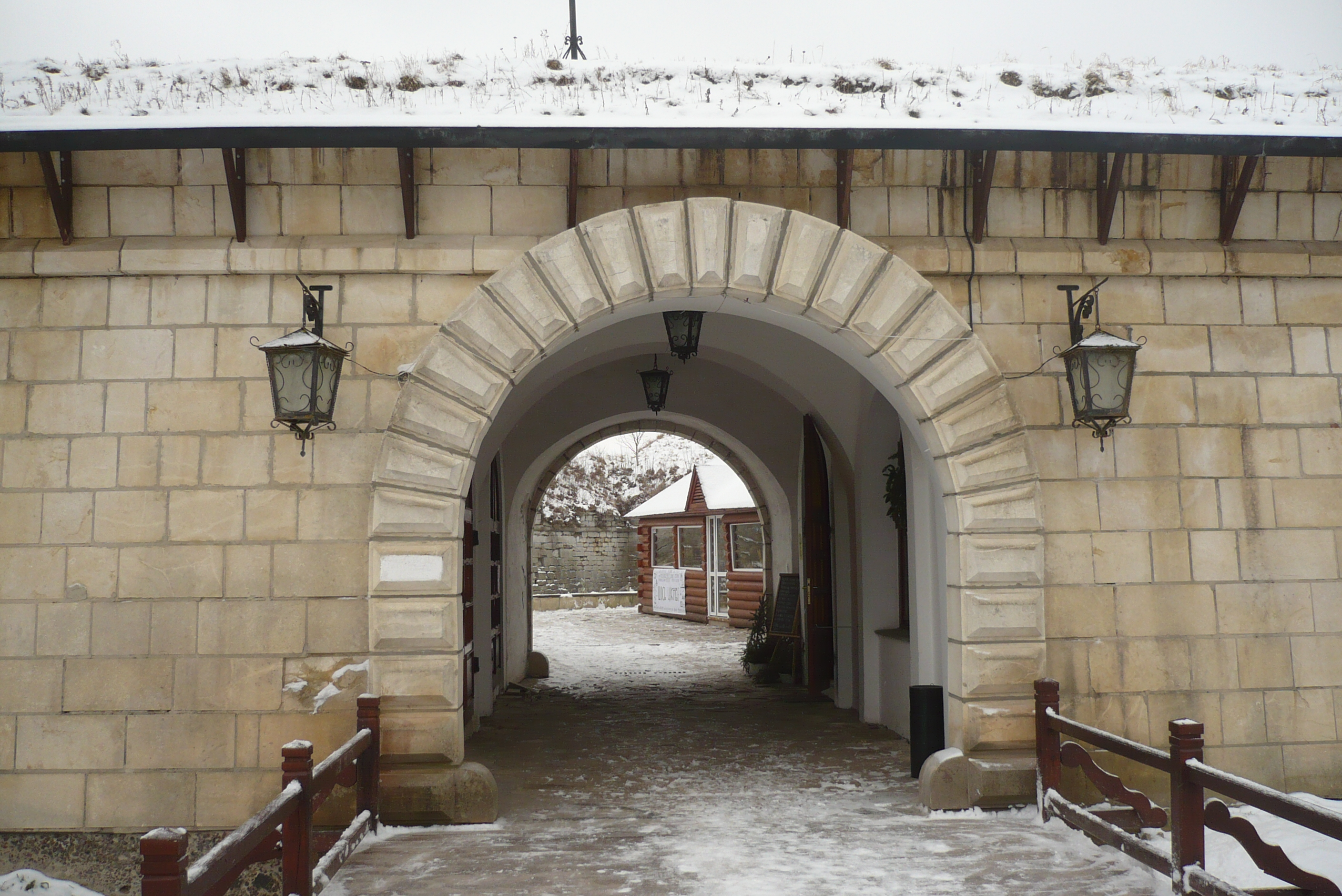 Zamek